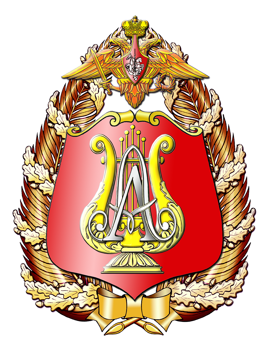 Официальный логотип Академического ансамбля песни и пляски Российской армии имени А. В. Александрова